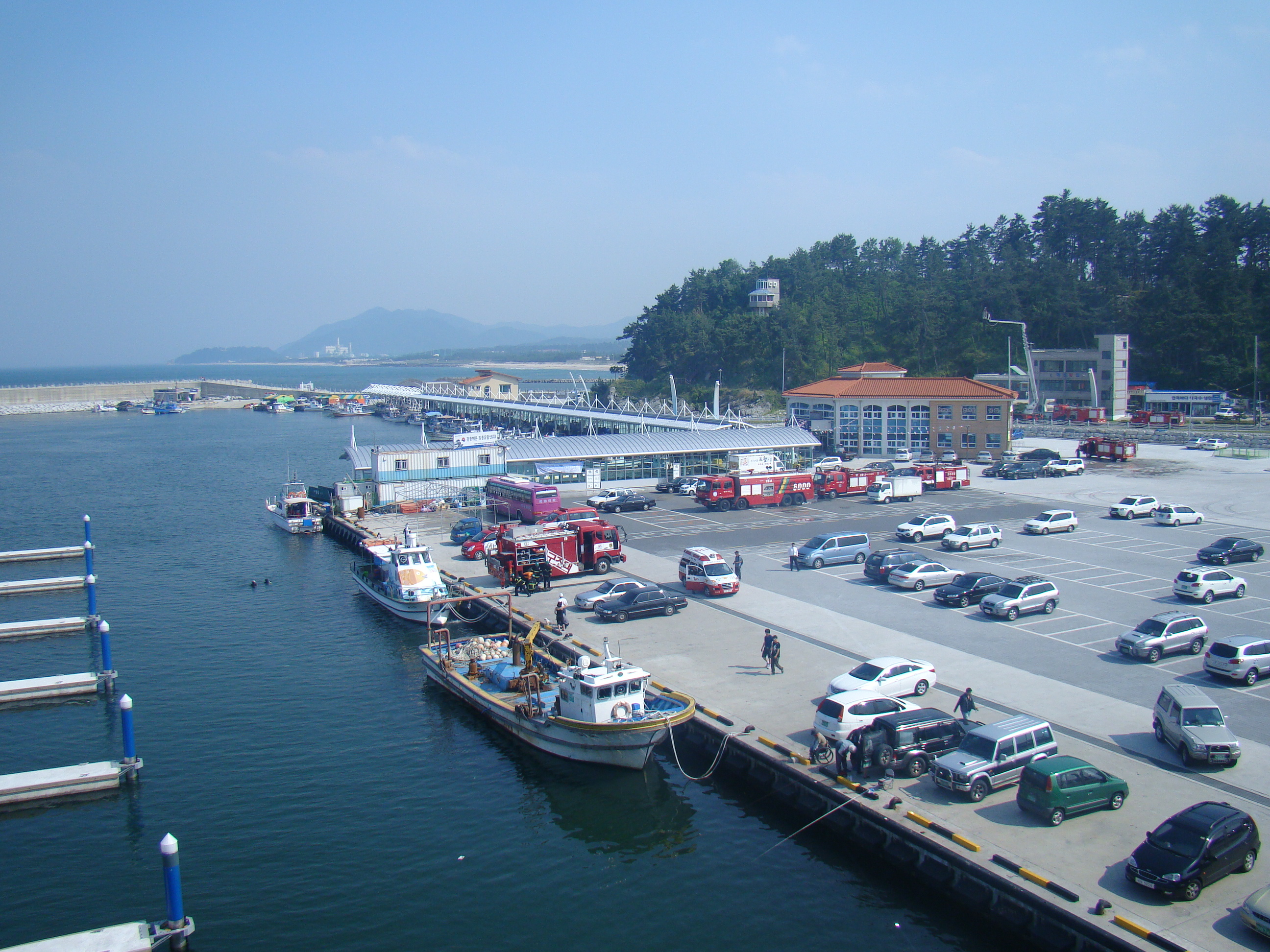 2011년 6월 29일 강릉안목항 강릉소방서 긴급구조종합훈련